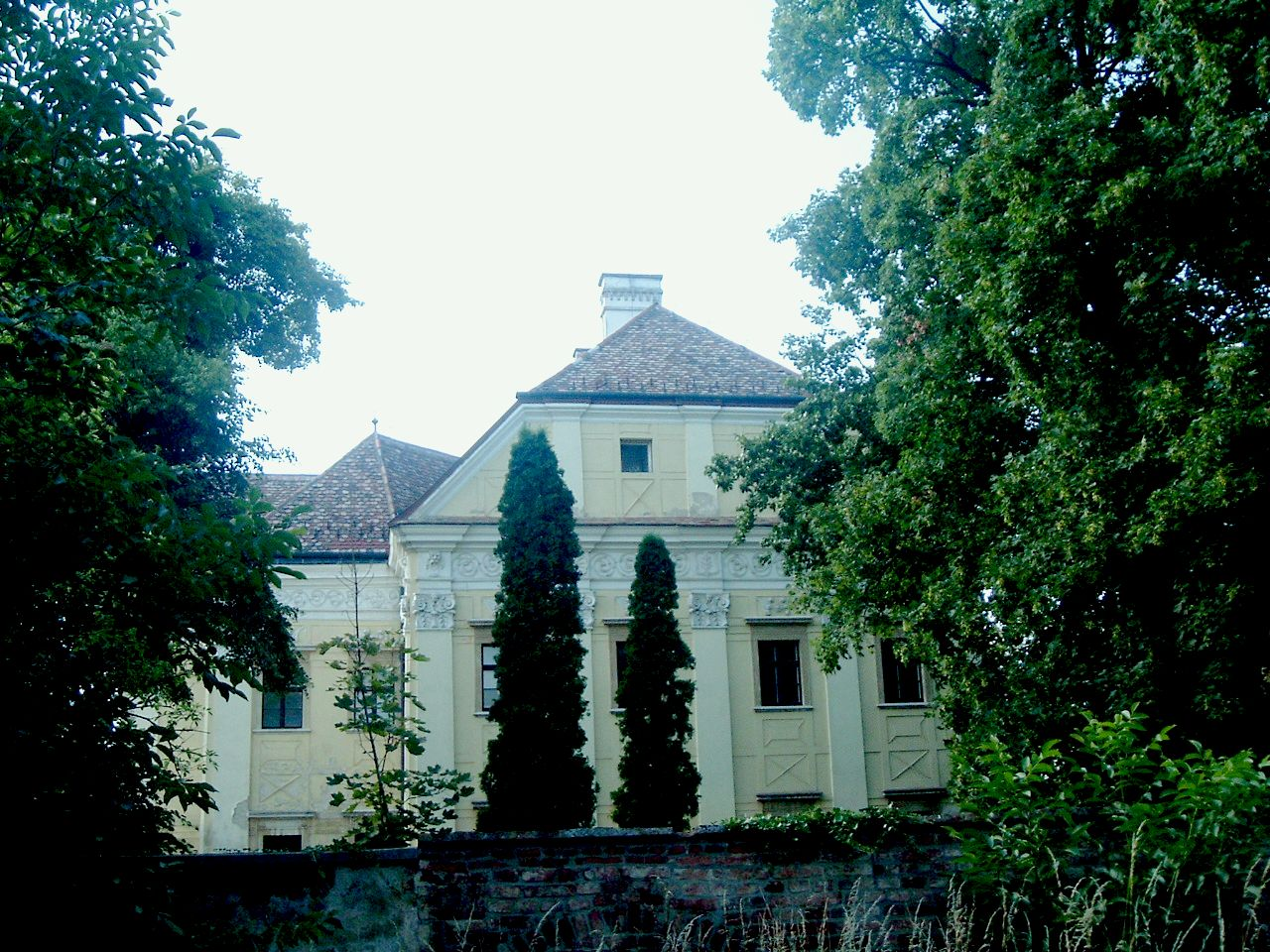 Felsőbüki Mansion in Bük